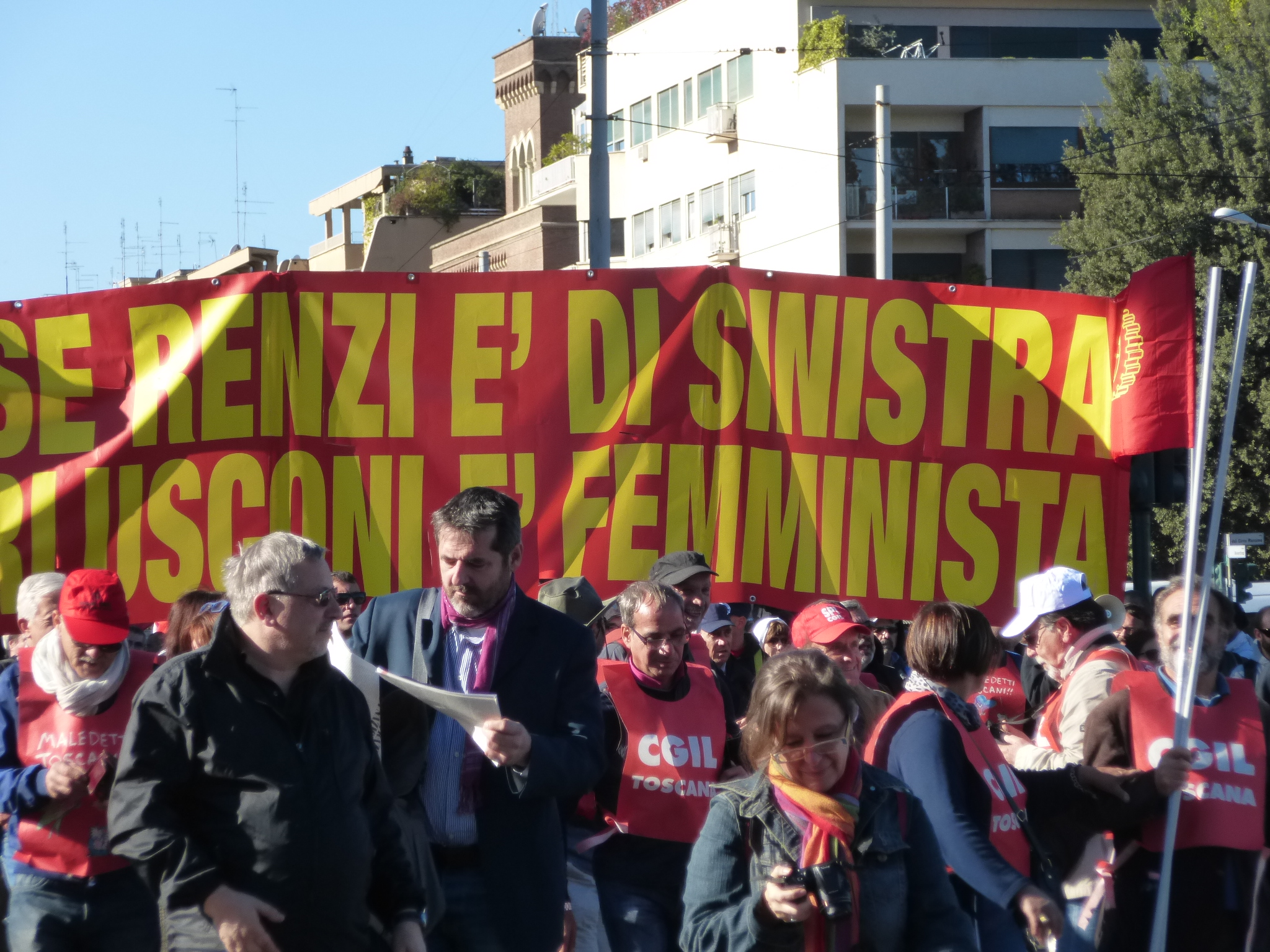 Roma, manifestazione CGIL del 25 ottobre 2014. Opinioni.